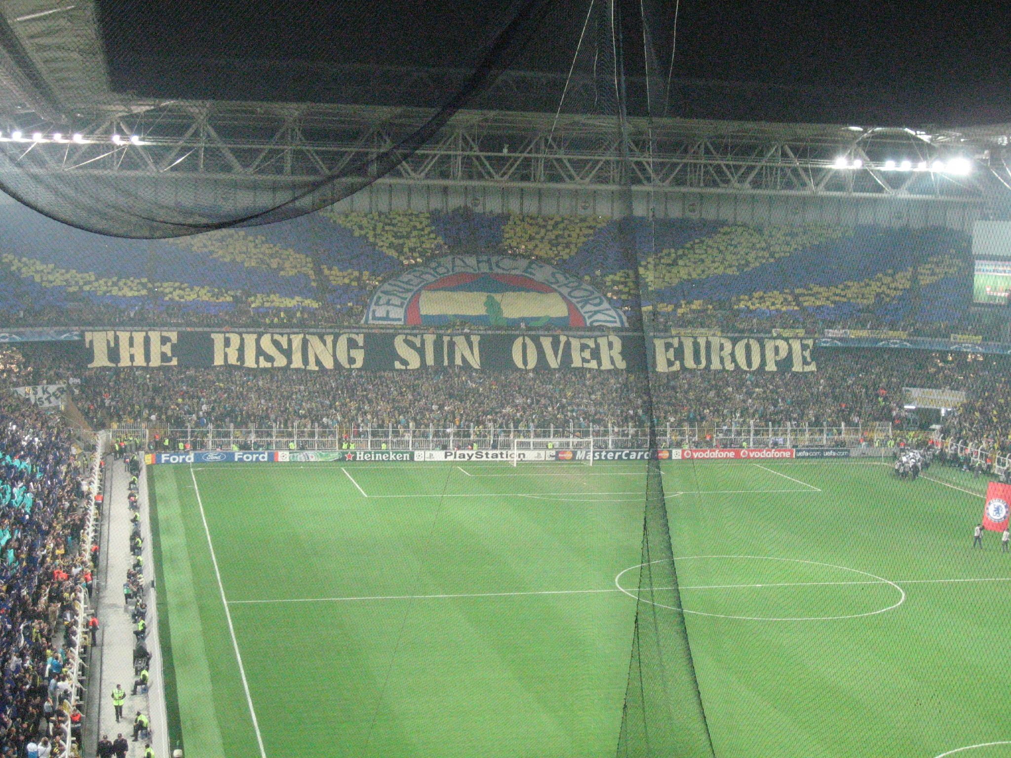 Fenerbahçe-Chelsea Stad Manzaraları